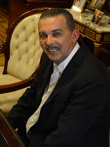 El presidente de Trinidad y Tobago, Anthony Carmona.